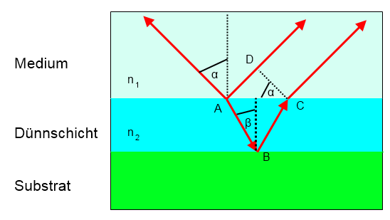 Strahlengang bei der Interferenz an dünnen Schichten